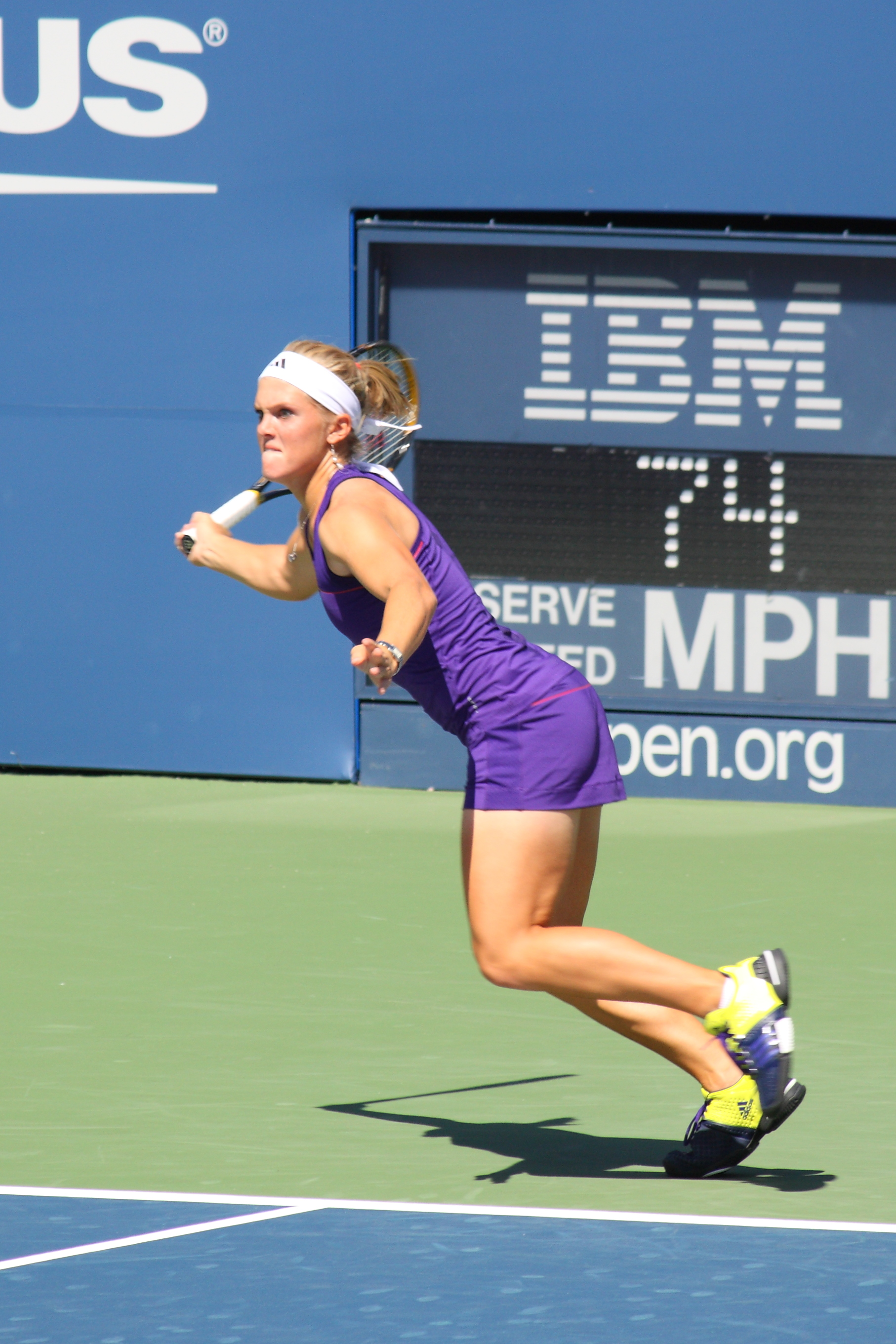 Melanie Oudin at US Open 2010. Ashe Stadium. First Round vs Olga savchuk